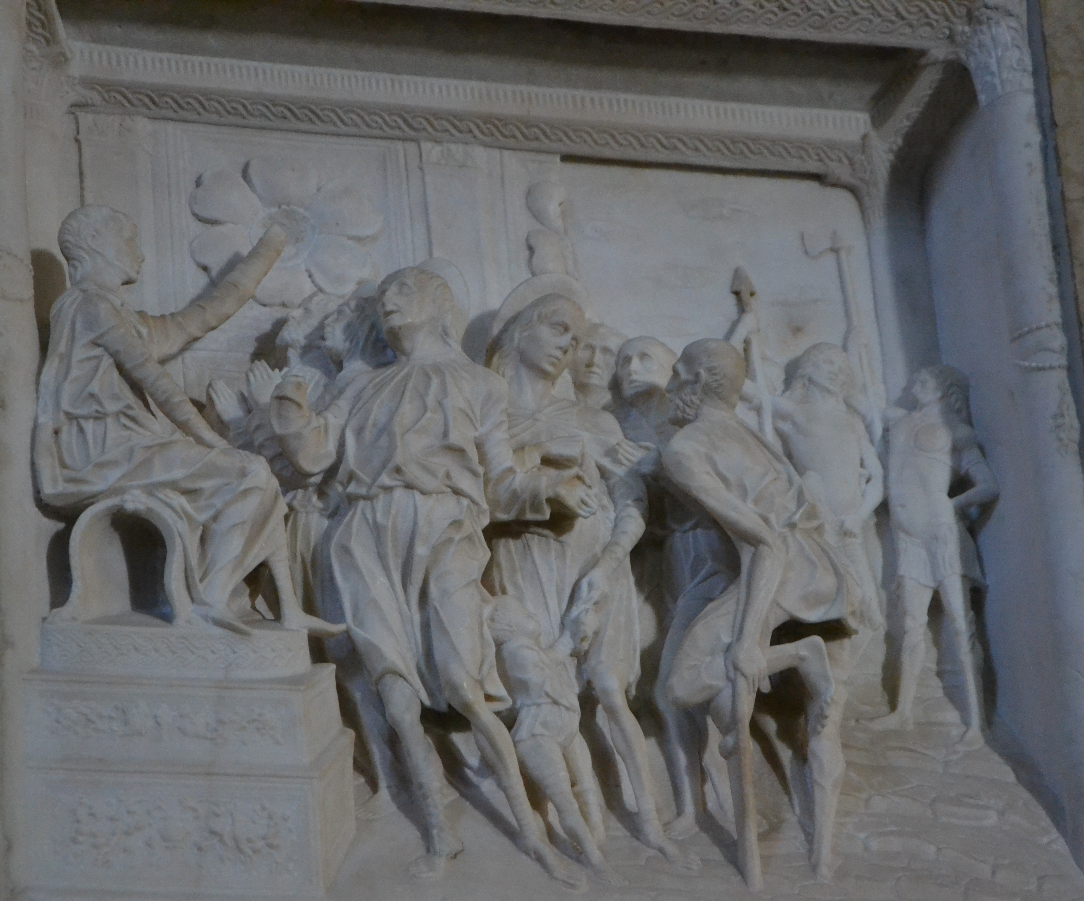 Duomo di Cremona, Pulpiti ottocenteschi, rilievi provenienti dall'Arca del martiri persiani di Giovanni Antonio Amadeo e Giovanni Antonio Piatti (1482)